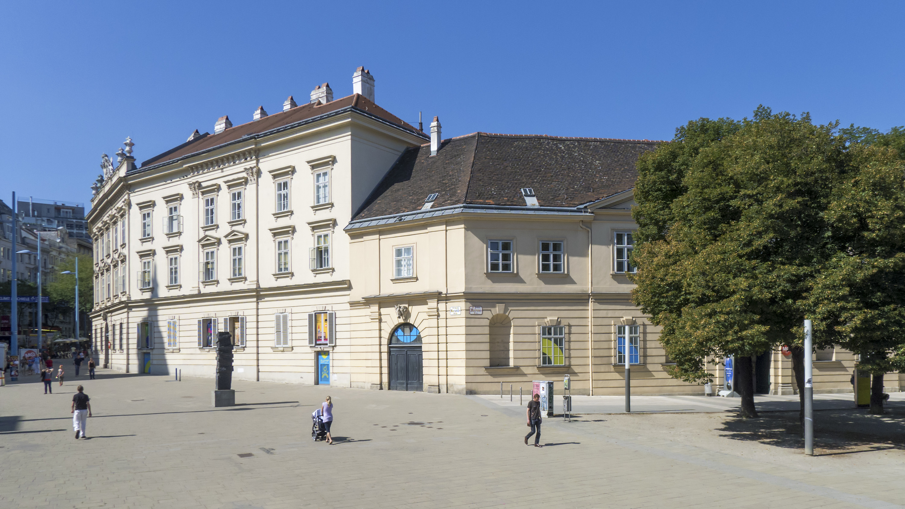 MuseumsQuartier in Wien 7, Mariahilfer Straße 2